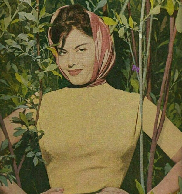 فخری خوروش